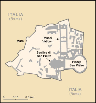 Map of Vatican City with Italian names. Mappa della Città del Vaticano con nomi in italiano.